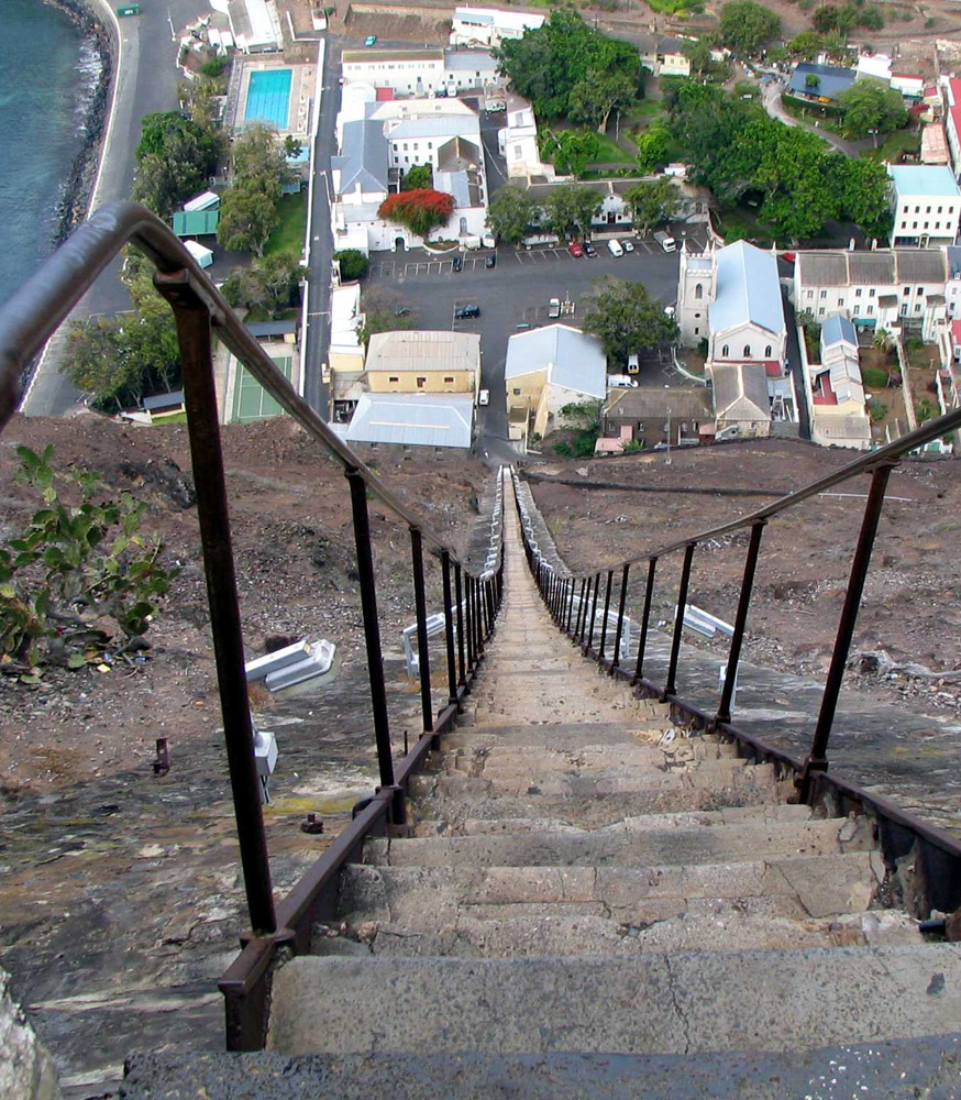 Jacob's Ladder escaleira de man de 699 escalos sita na cidade de Jamestown en St. Helena